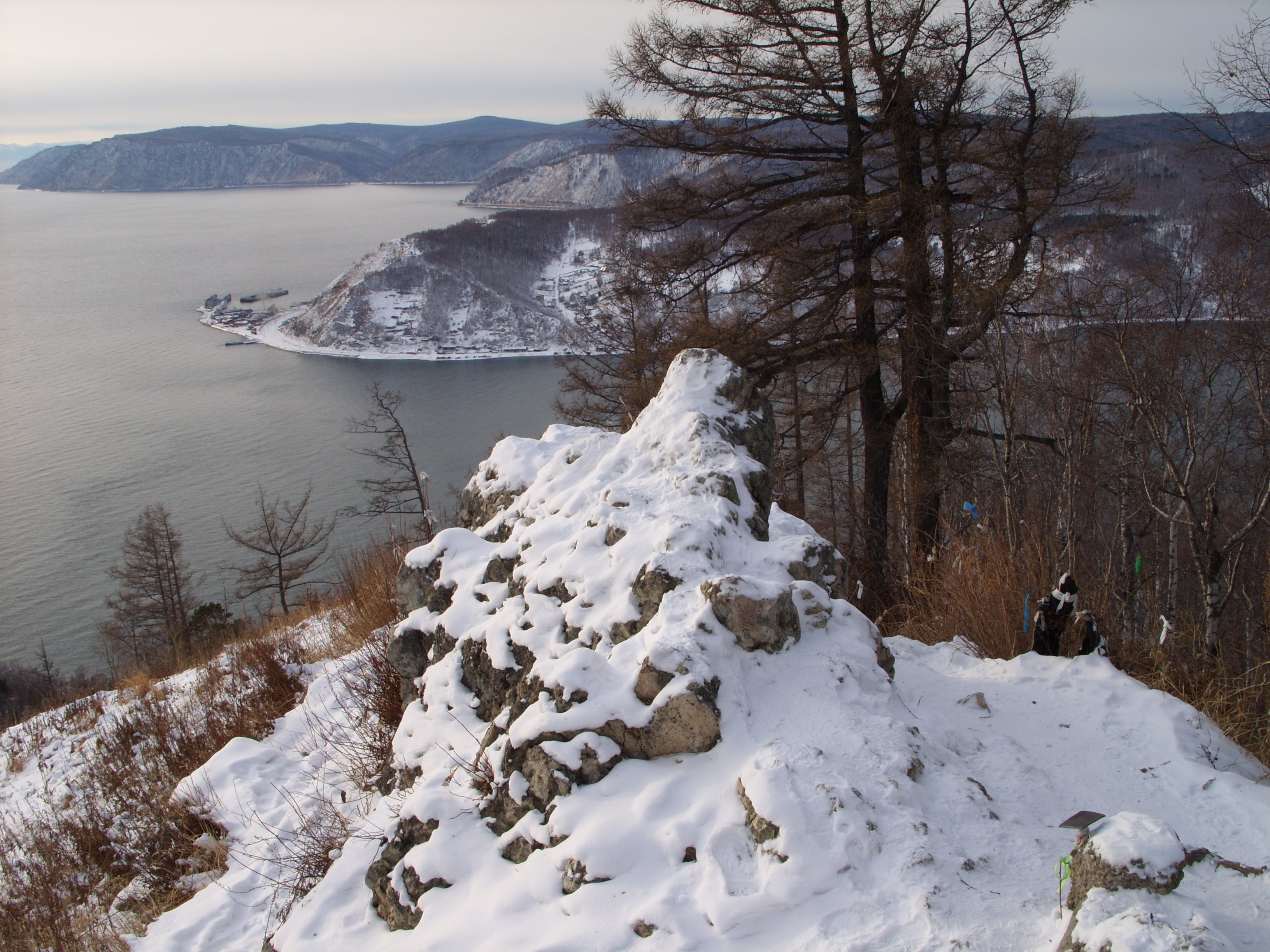 Гора с обзорной площадкой у истока Ангары